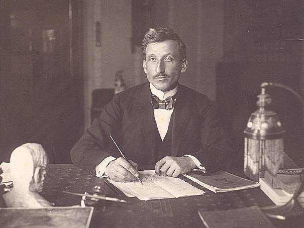 Alois Král (1877 - 1972), Moravský speleolog.